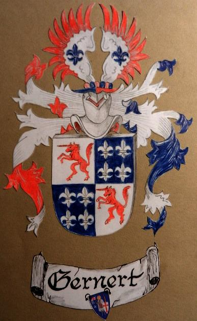 Gernert Wappen aus Thüringen, Stadtilm, Hildburghausen, Bad -Wildungen nach einer Vorlage gezeichnet Jürgen Gerner. Das Wappen soll in Eisenach gegeben worden sein.